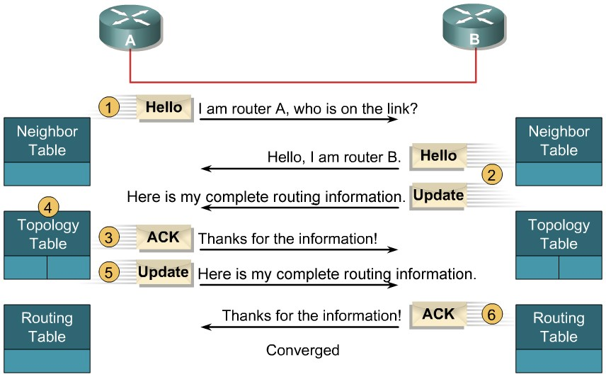 бб